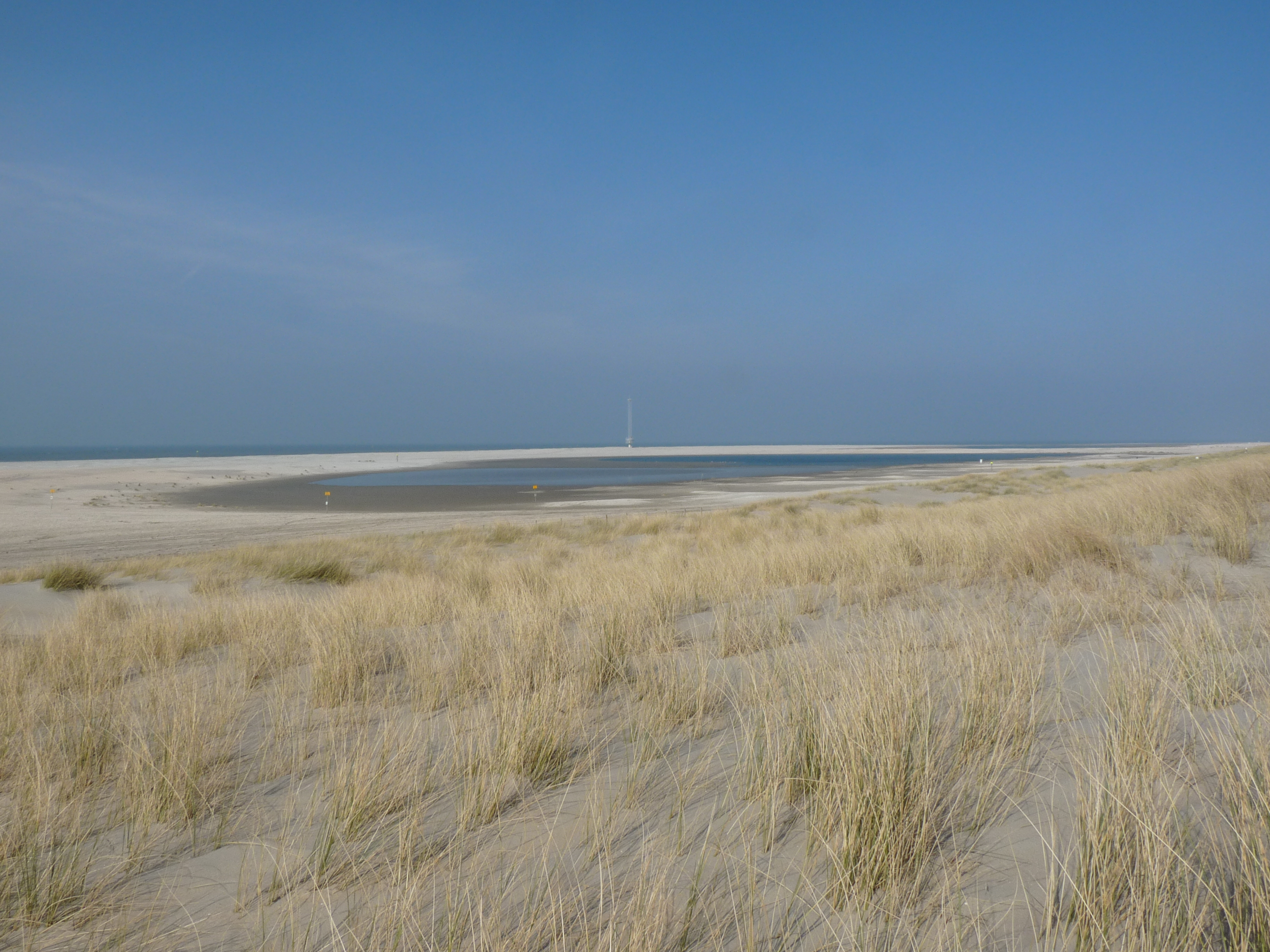 Door zandverstuiving is aan de zuidelijke kant een zeer ondiep gescheiden gedeelte van het meer ontstaan.